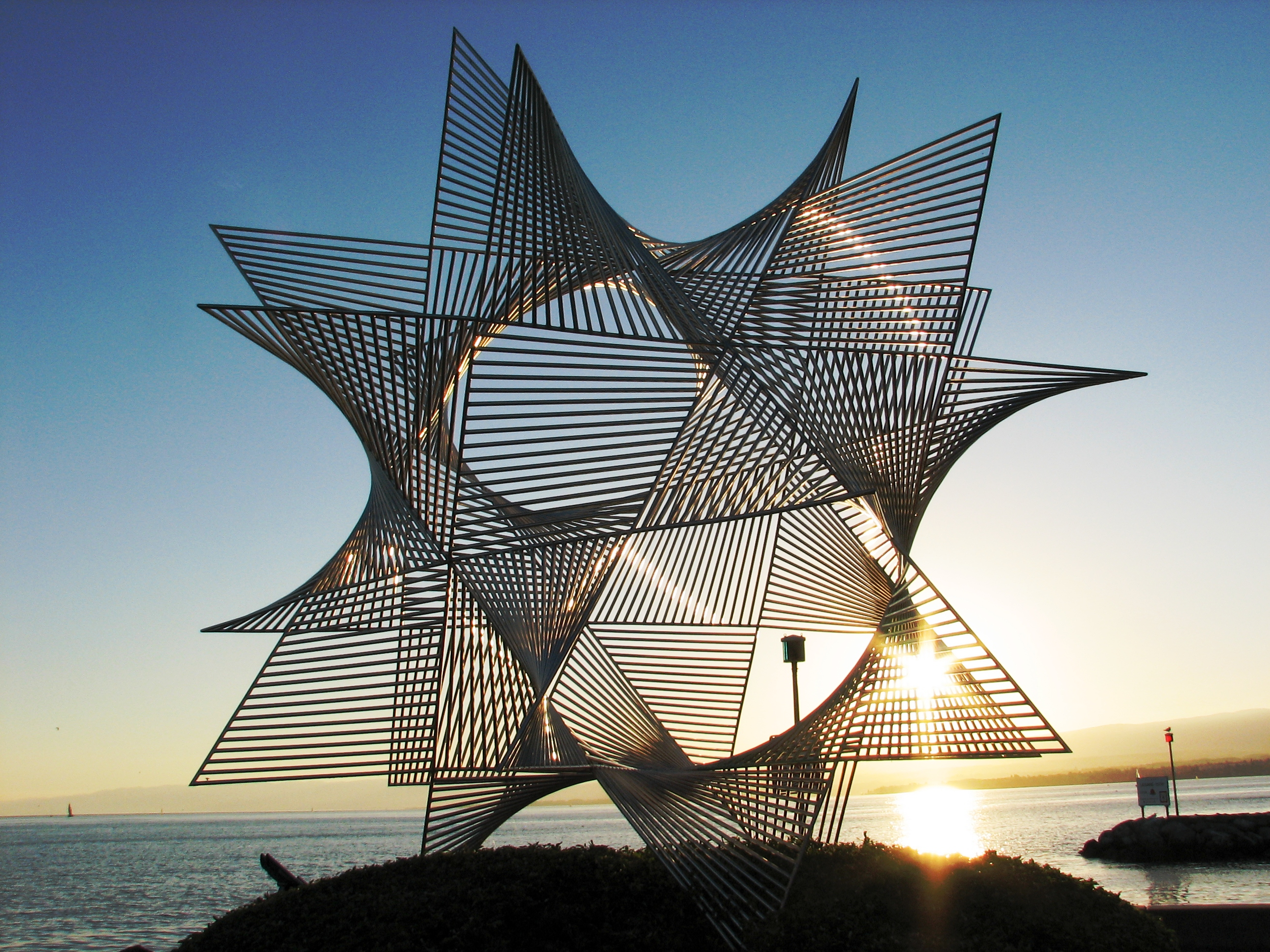 Lausanne (Schweiz): Skulptur im Hafen des Stadtteils Ouchy